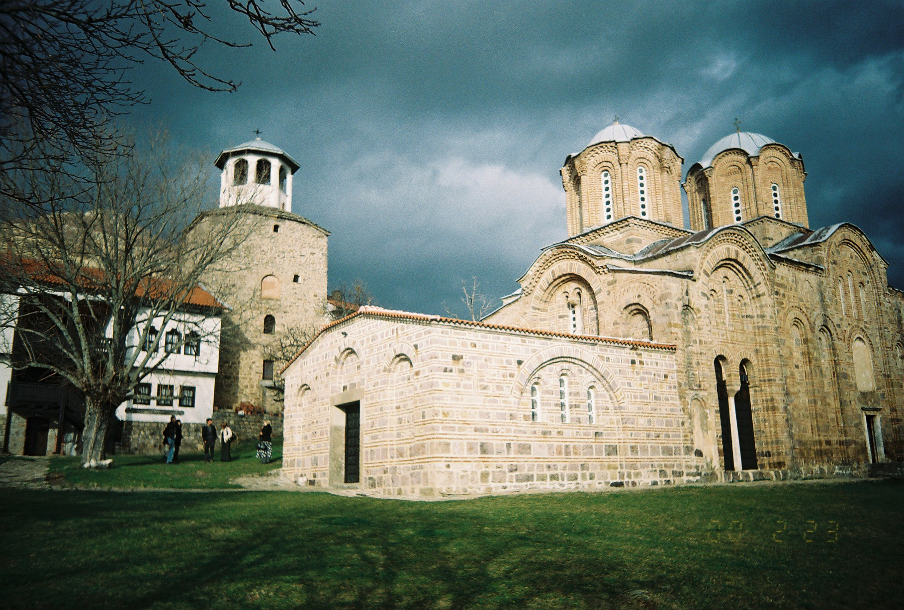 Lesnovski Manastir